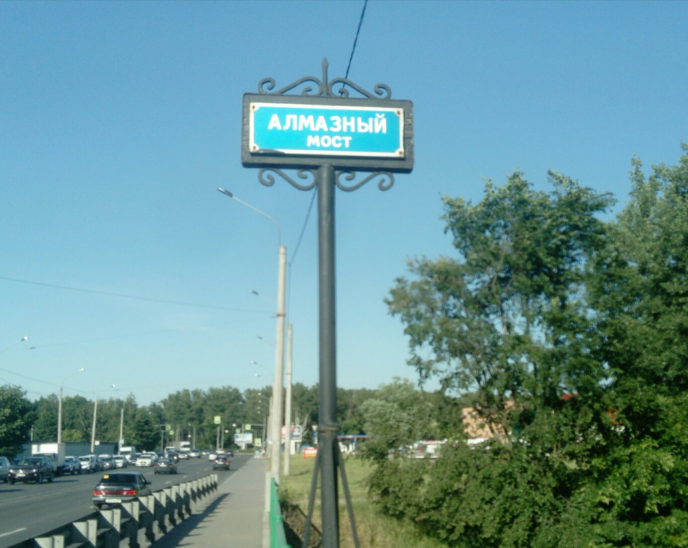 Алмазный мост через Волковку